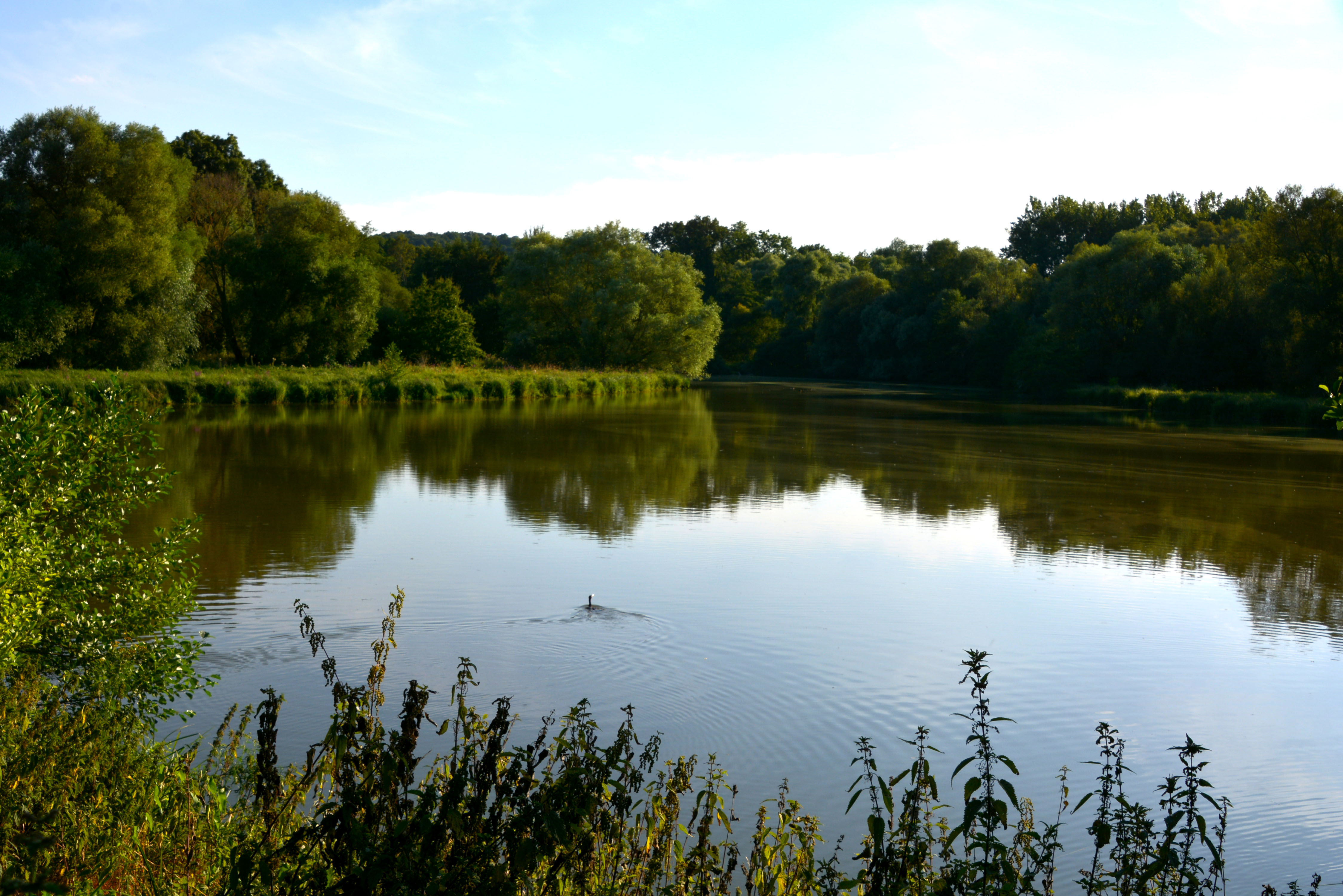 Etang de régulation de l'Orge